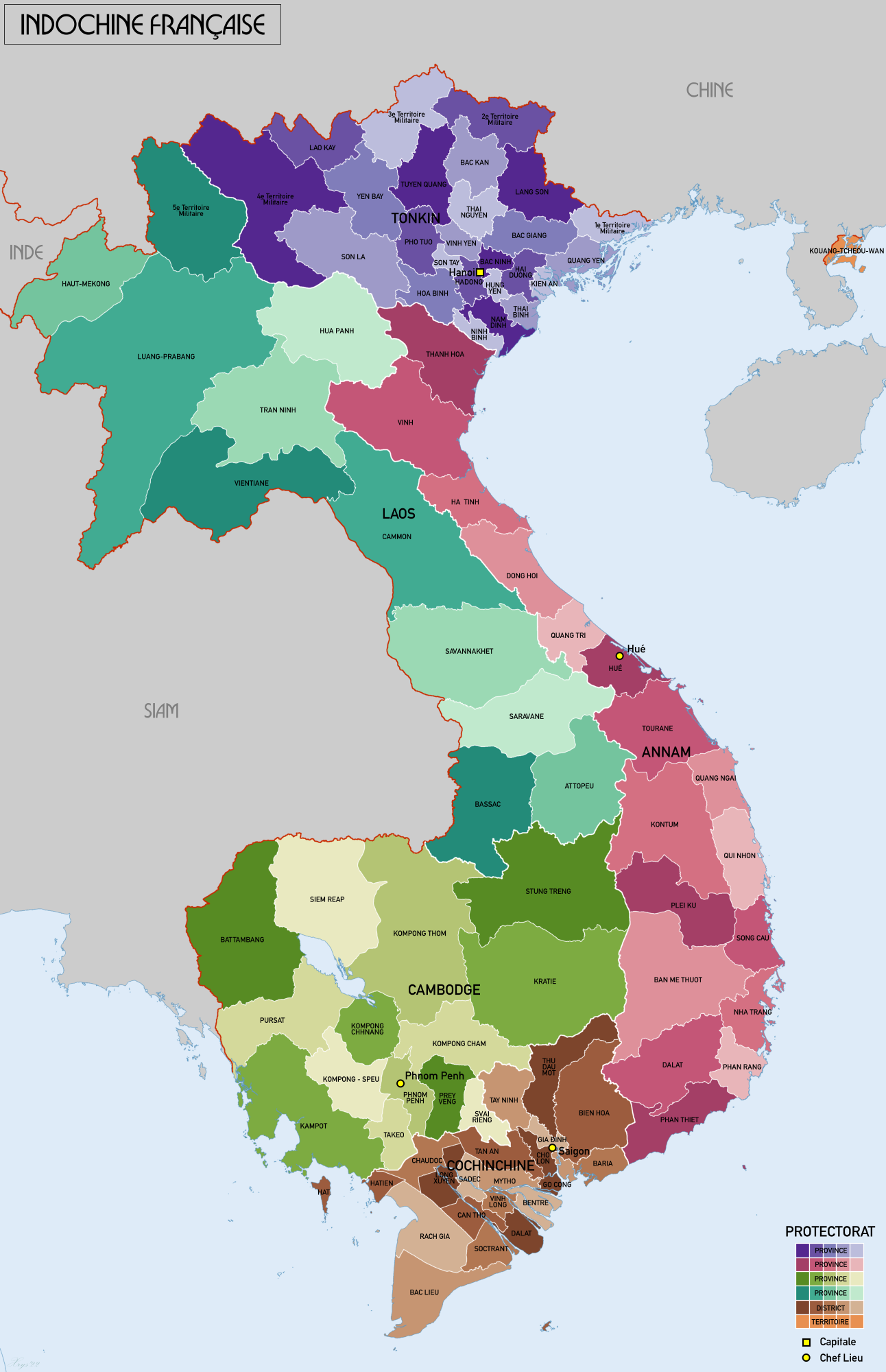 Carte administrative de l'Indochine Francaise en 1937. Dans la carte des protectorats et provinces/districts sont montres. La source de donnees: AMS 509 (Indochina & Thailand) 1:250k (PCL Map collection). Reseau Routier de l'Indochine 1:2m (BNF).